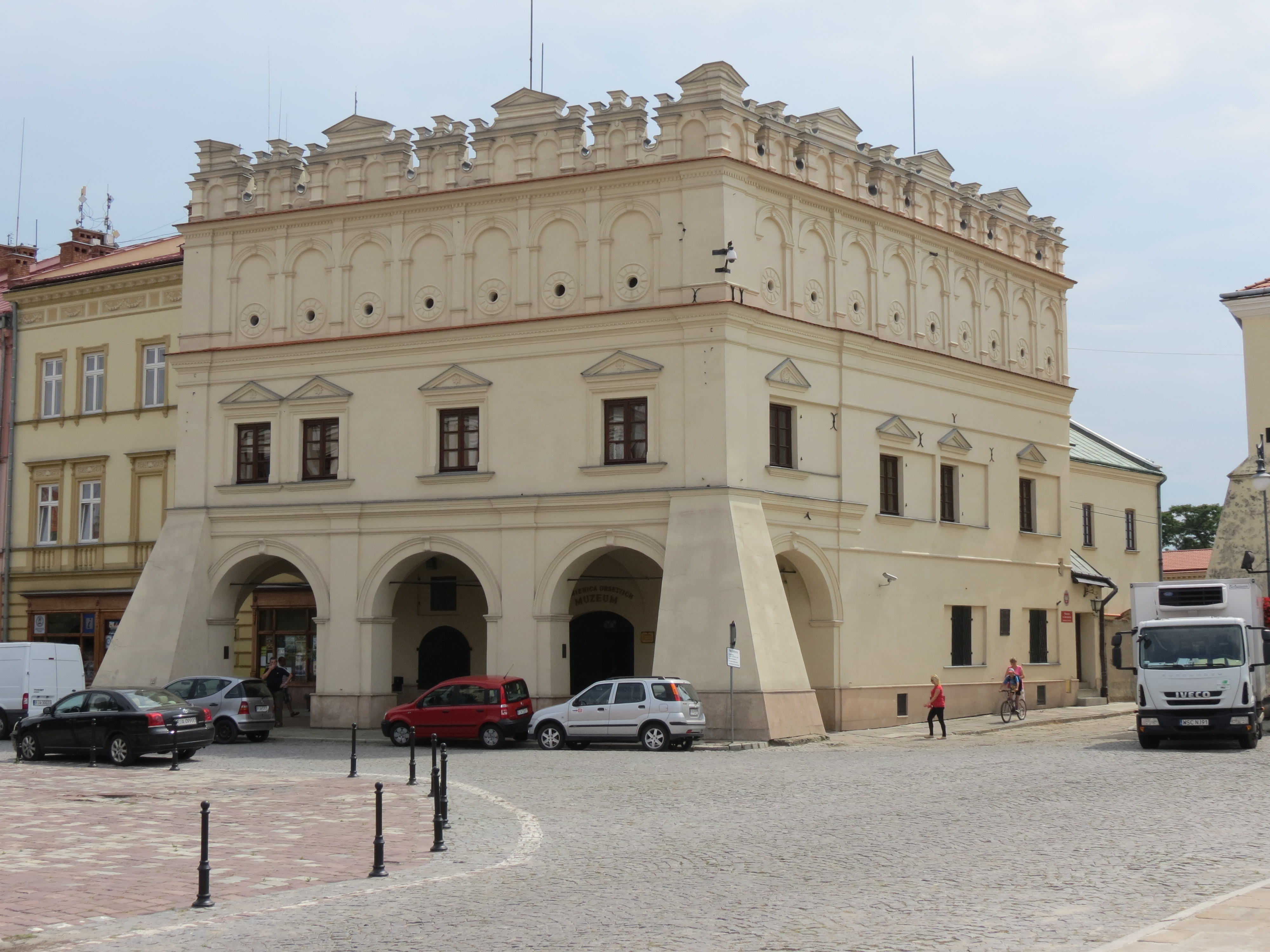 Jarosław, kamienica "Orsettich", 1570, XVII, XIX, 1965